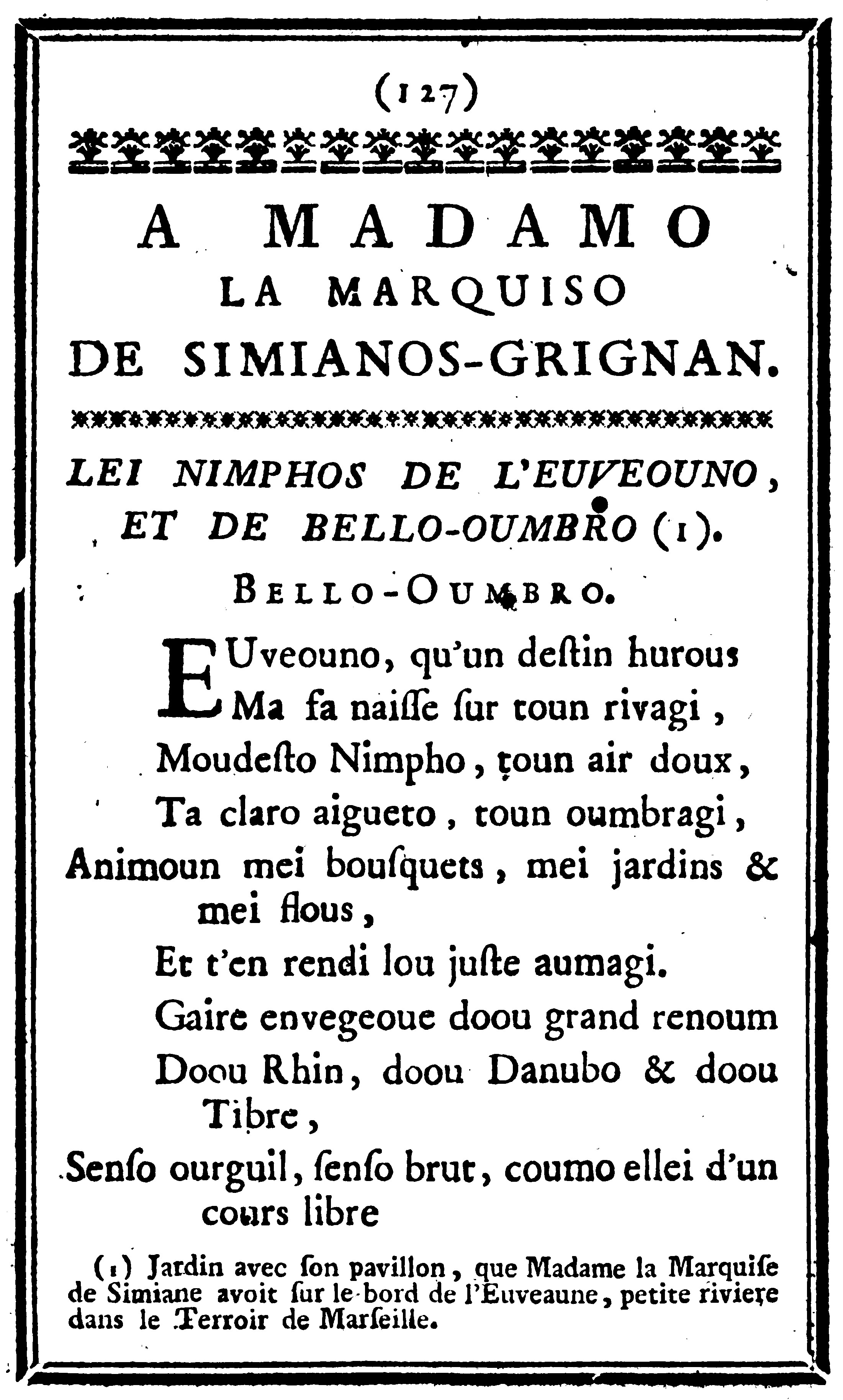 pagina d'un recueil de Totsant Gros